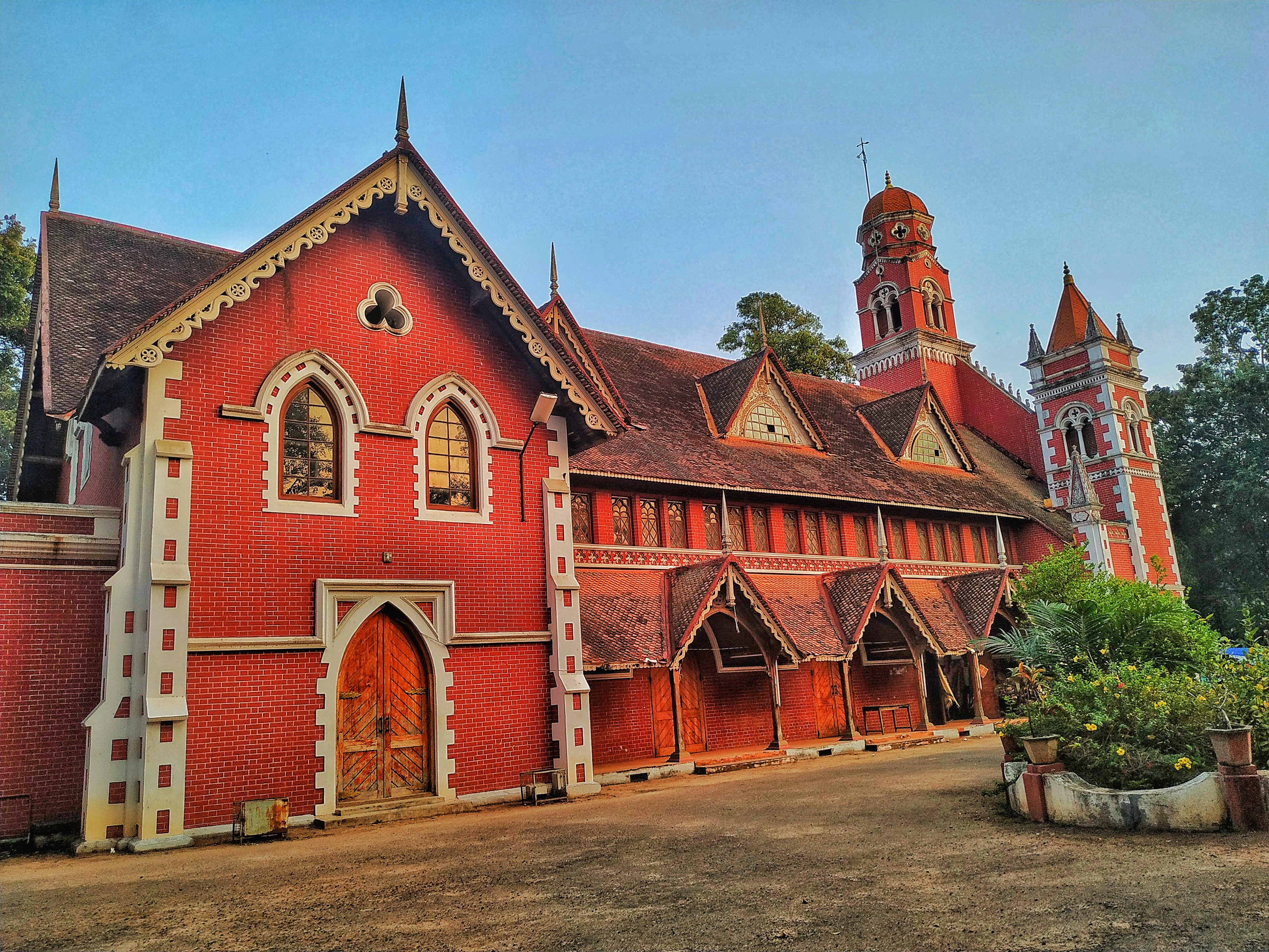 VJT Hall Palayam Thiruvananthapuram